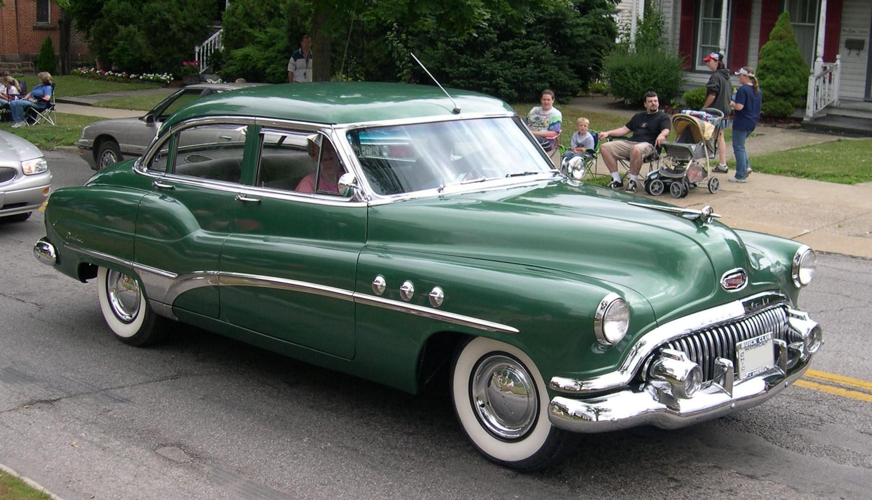 1951 Buick Super Series 50 Model 51 4-door Sedan